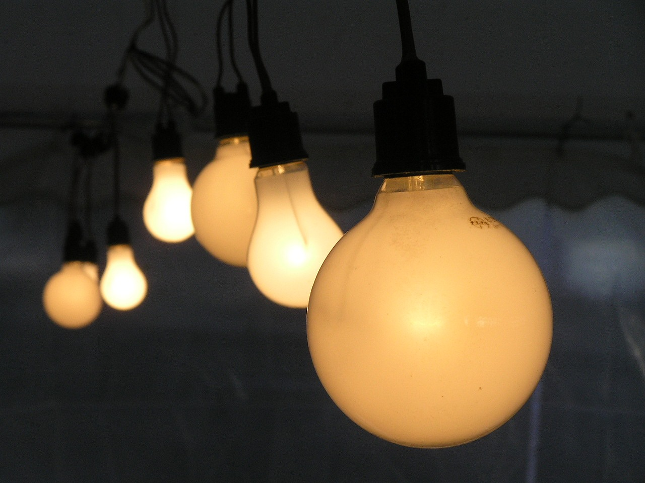 白熱電球（神戸市西区住吉神社）